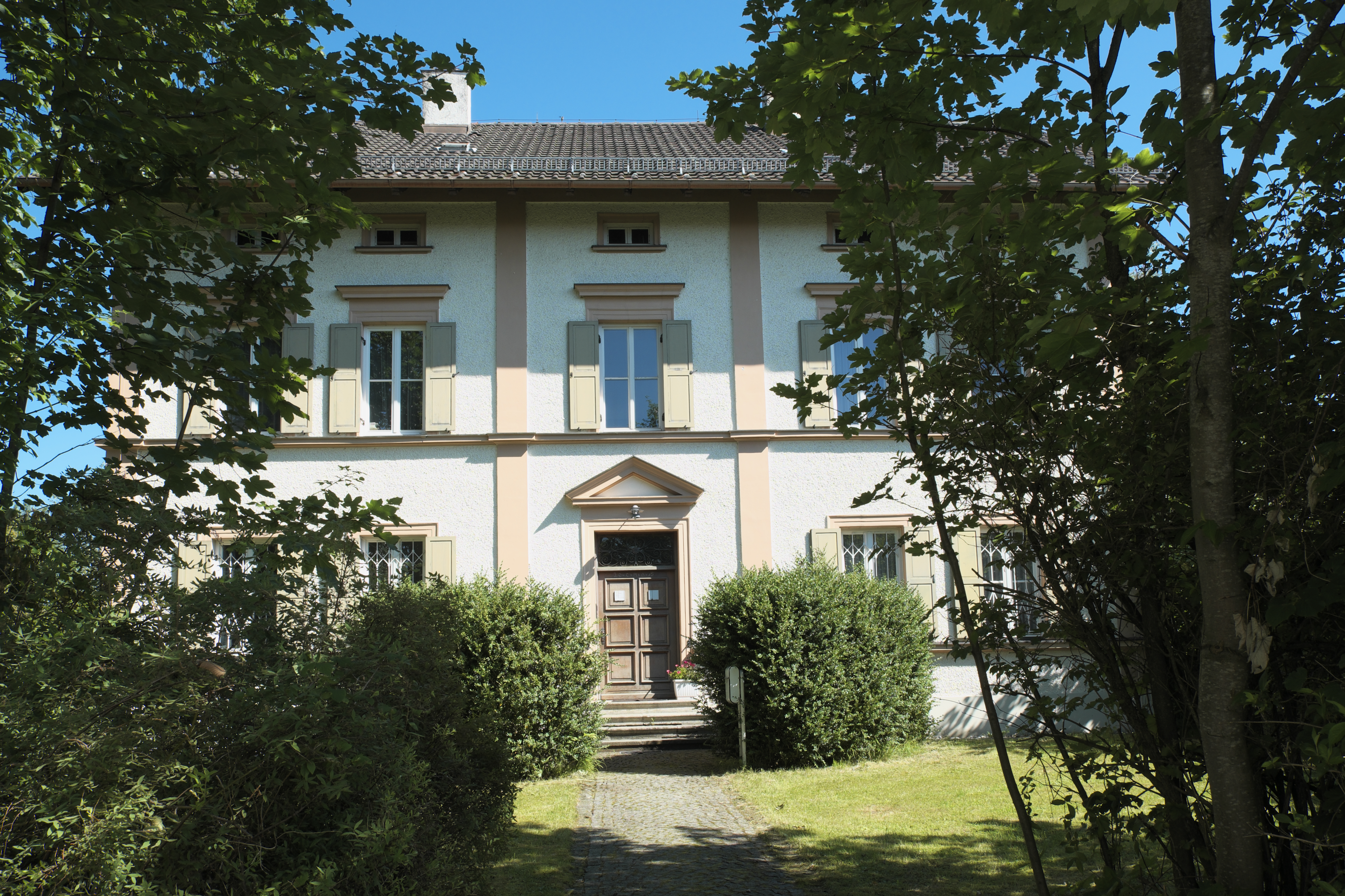 Pfarrhaus in Eiselfing im Landkreis Rosenheim (Bayern/Deutschland)